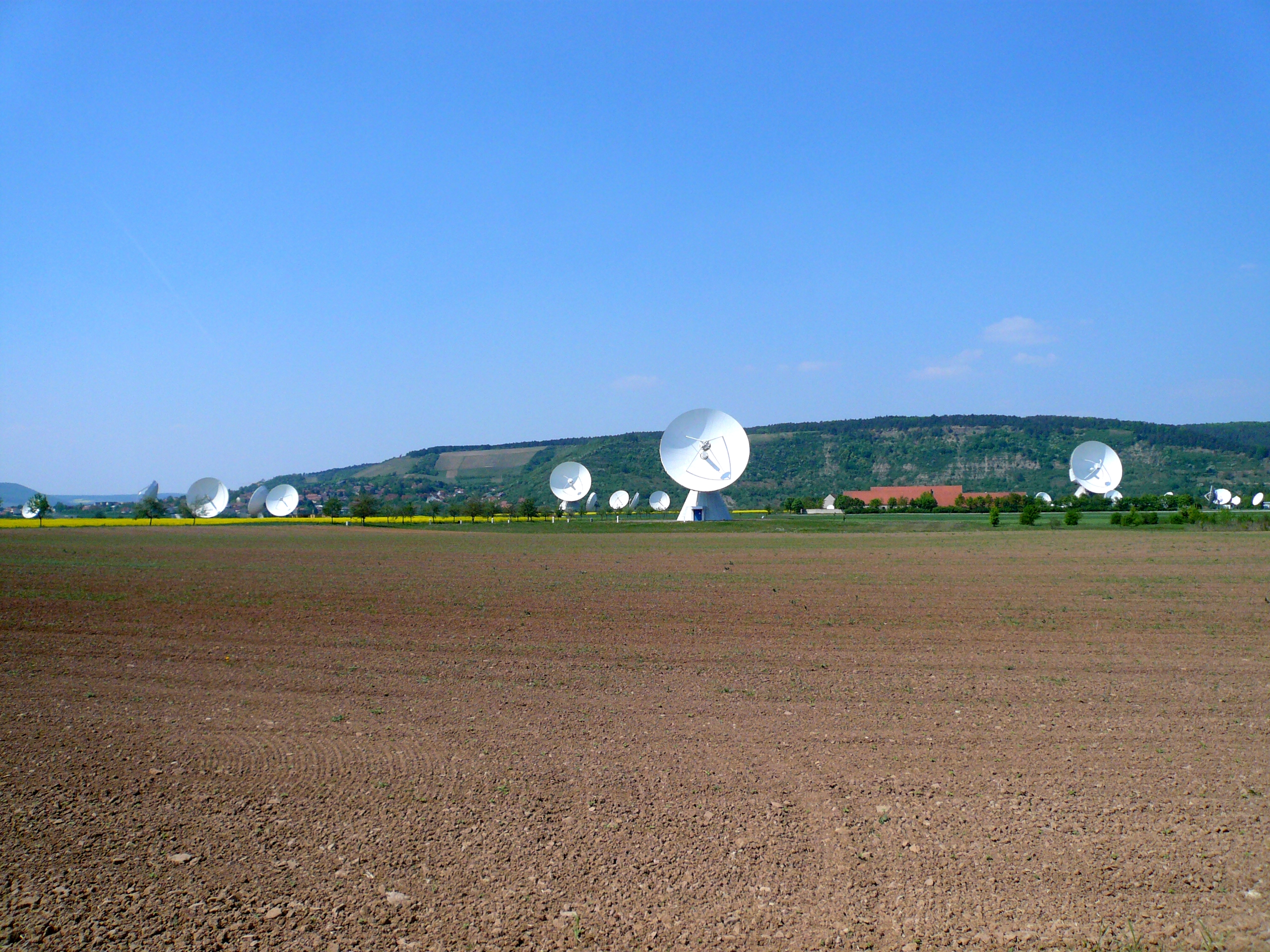 Satellite ground station Fuchsstadt, Germany